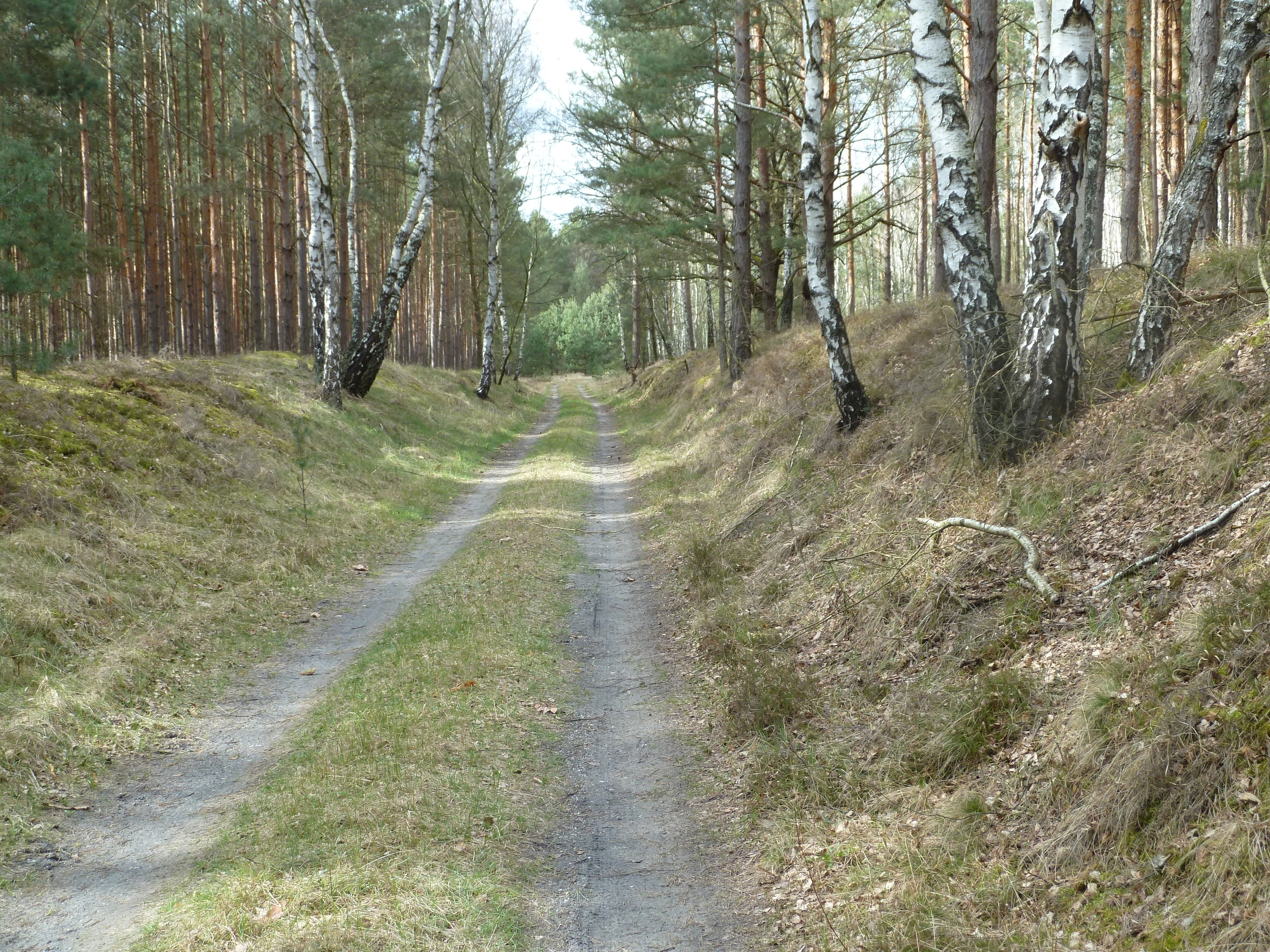 Ehemalige Trasse der Heeresfeldbahn bei Sperenberg; Naturschutzgebiet „Kummersdorfer Heide/Breiter Steinbusch“.